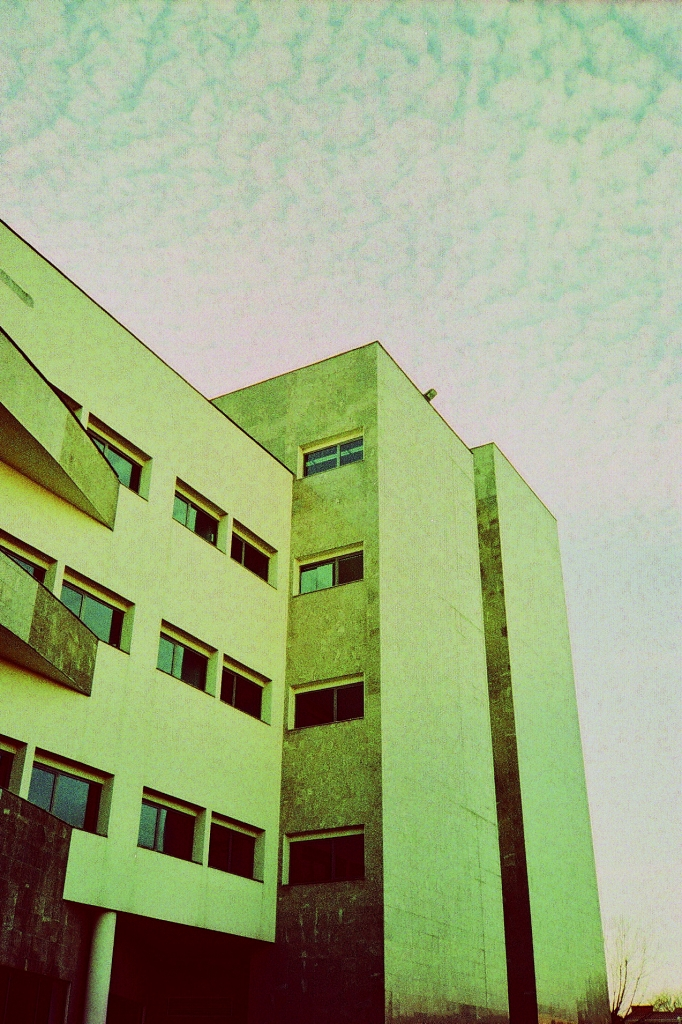 Instituto Superior de Engenharia do Porto (Edifício "F") / Museu do Instituto Superior de Engenharia do Porto. Rua Doutor António Bernadino de almeida, 431, freguesia de Paranhos, Porto, Portugal.